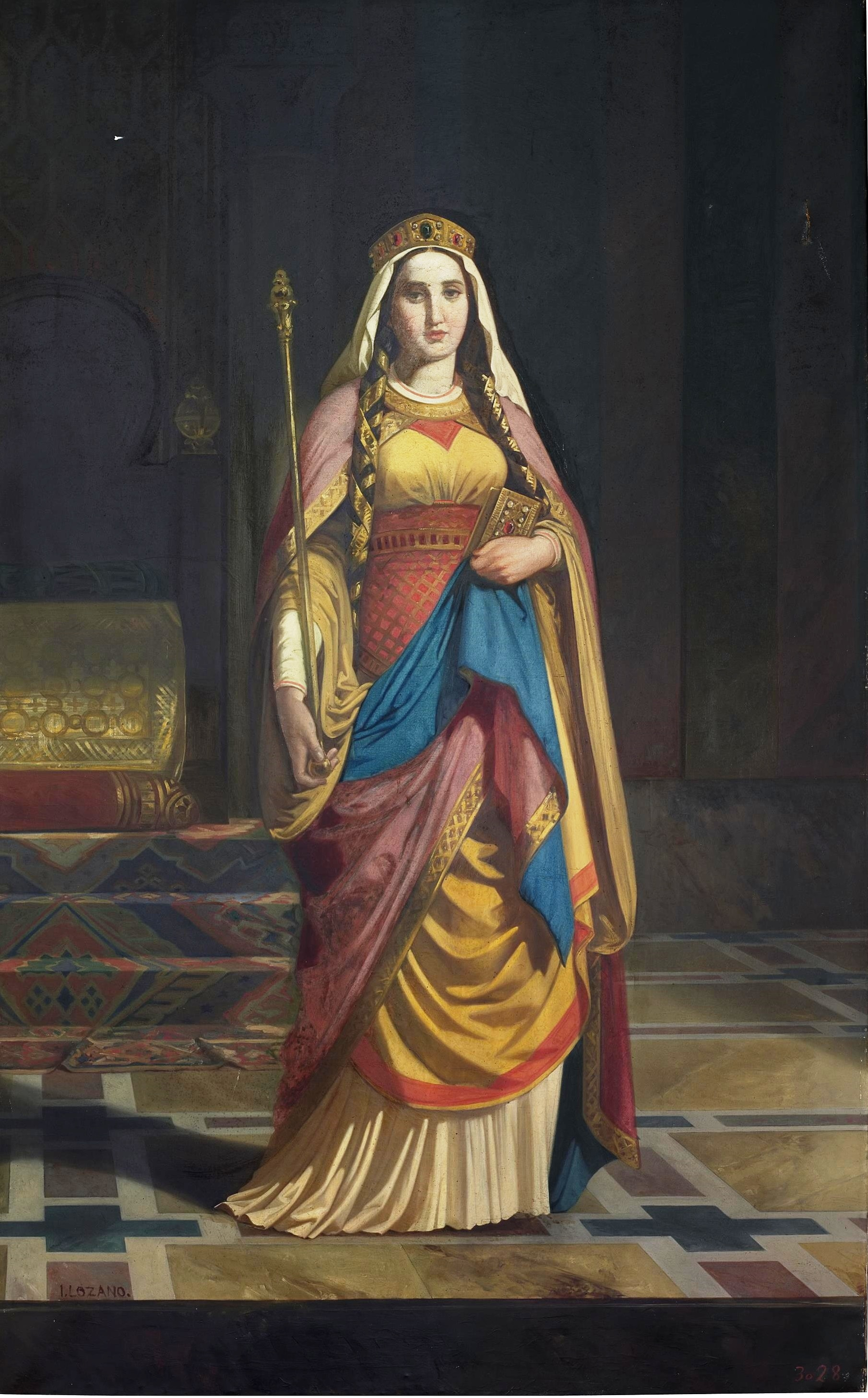 Retrato imaginario de Ozenda, reina consorte de Asturias por su matrimonio con el rey Bermudo I el Diácono y madre del rey Ramiro I de Asturias.